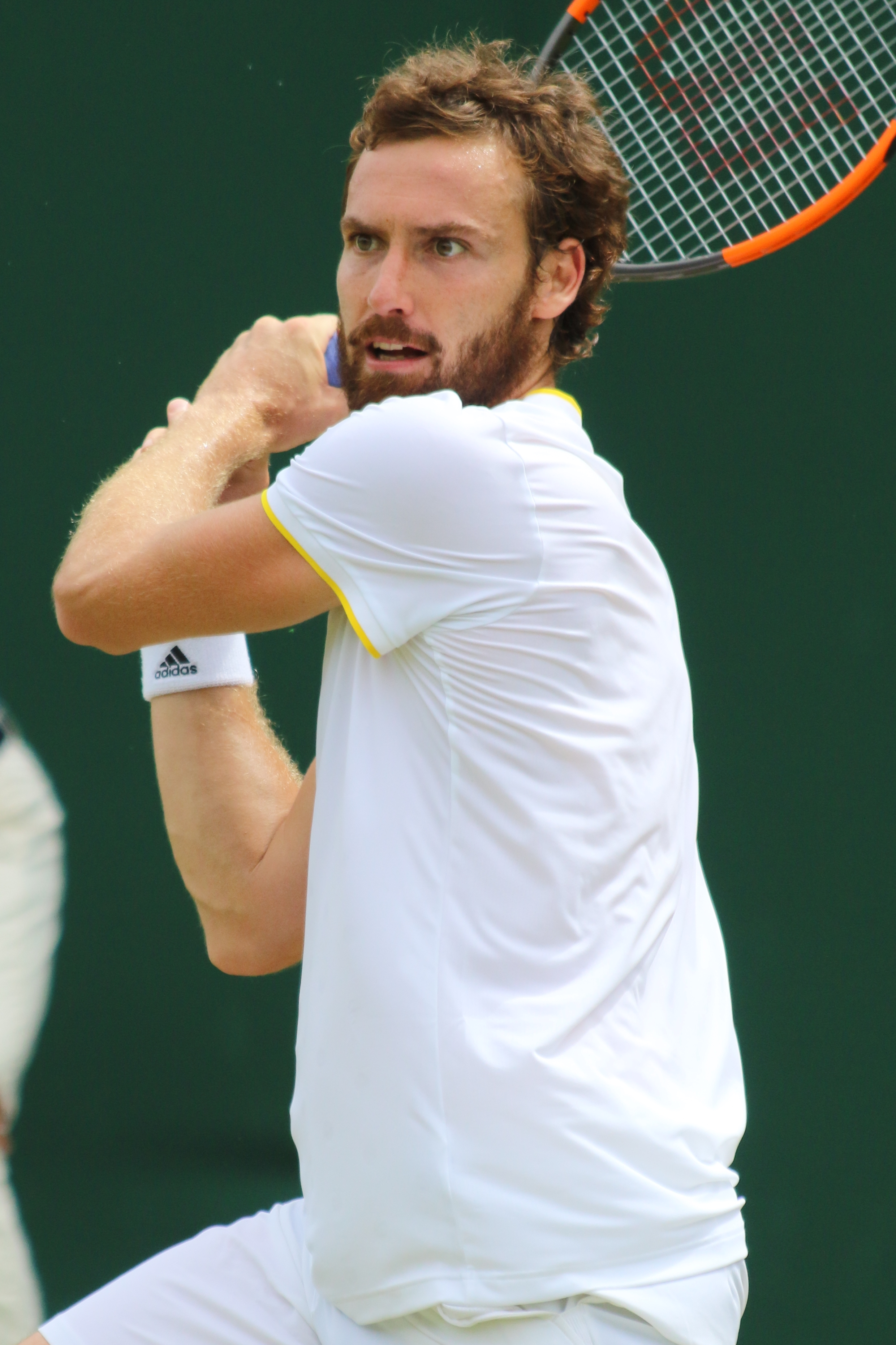 Gulbis WM17 (11)